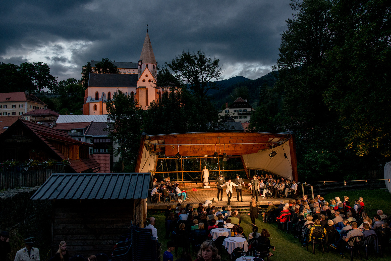 Shakespeare in Styria, Murau 2015: Julius Caesar, inszeniert von Nicholas Allen und Roberta Brown. Der als Bühne verwendete Musikpavillon im Stadtpark stammt von Günther Domenig aus dem Jahre 1995.